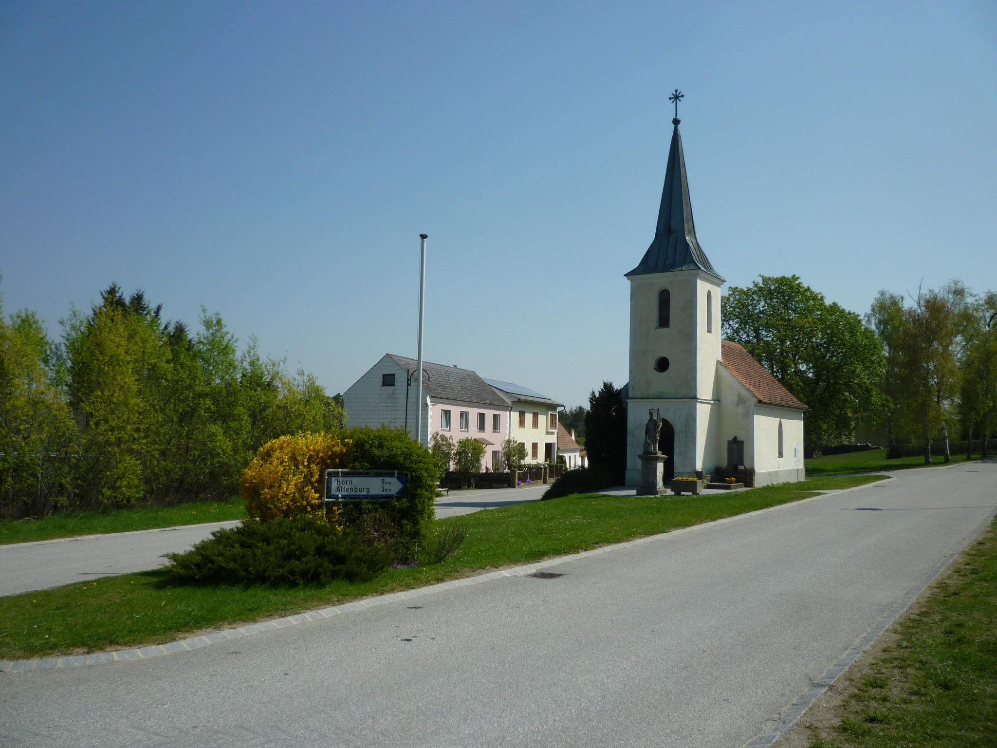 Mahrersdorf, Gemeinde Altenburg, Nierderösterreich, Österreich